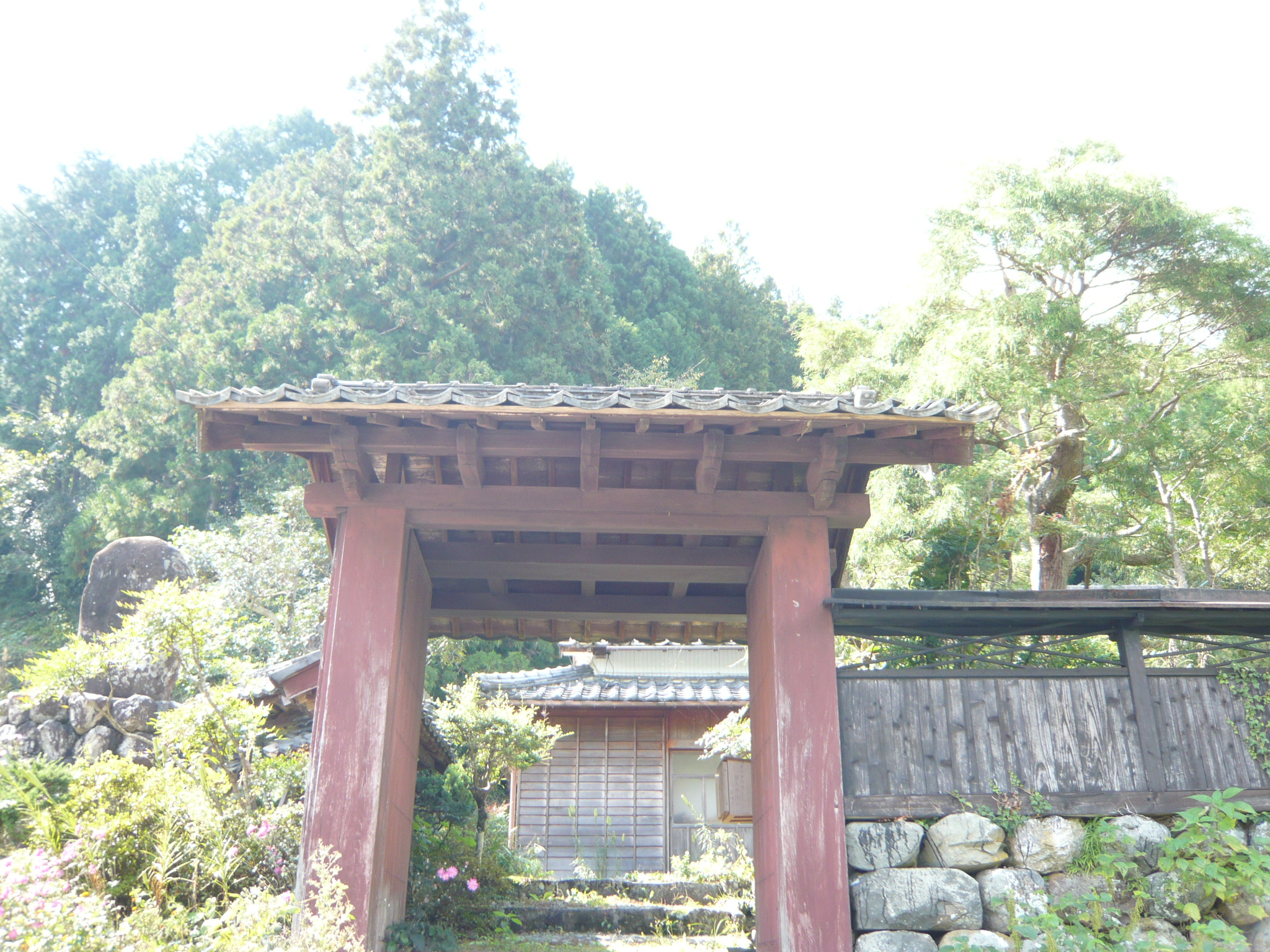 吉村寅太郎の生家の門（高知県津野町）